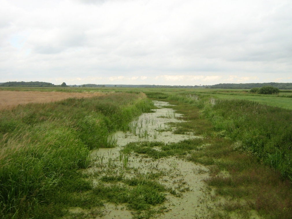 Der Augraben unterhalb des Schlosses Rossewitz zwischen den Dörfern Liessow und Recknitz im Urstromtal der Recknitz. Blick flußaufwärts. Bei Liessow bifukiert der Augraben mit der Recknitz. (Mecklenburg-Vorpommern, Landkreis Güstrow